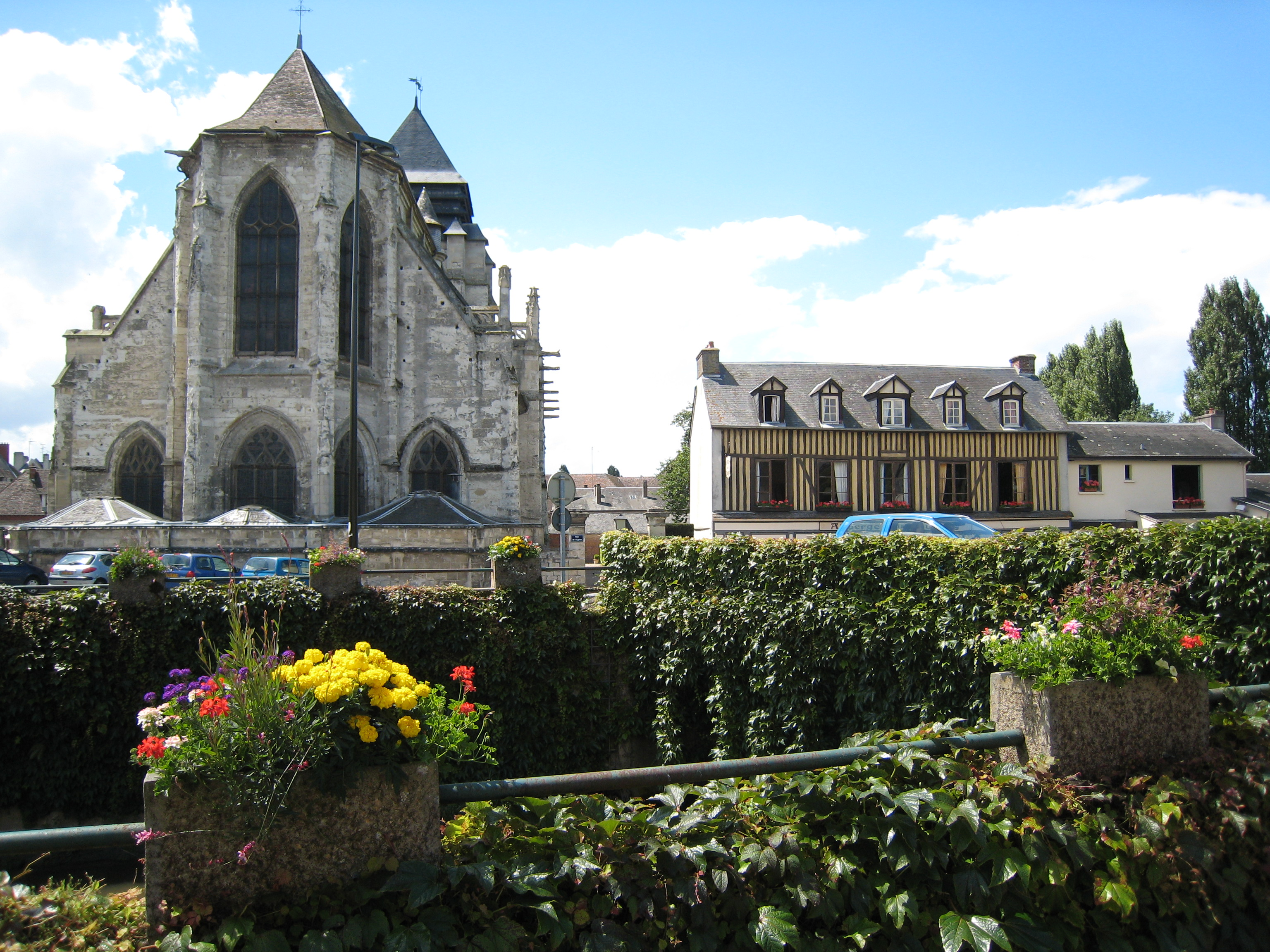 Église Saint-Michel, quartier de Vaucelles, Pont-l'Évêque (Calvados, France)